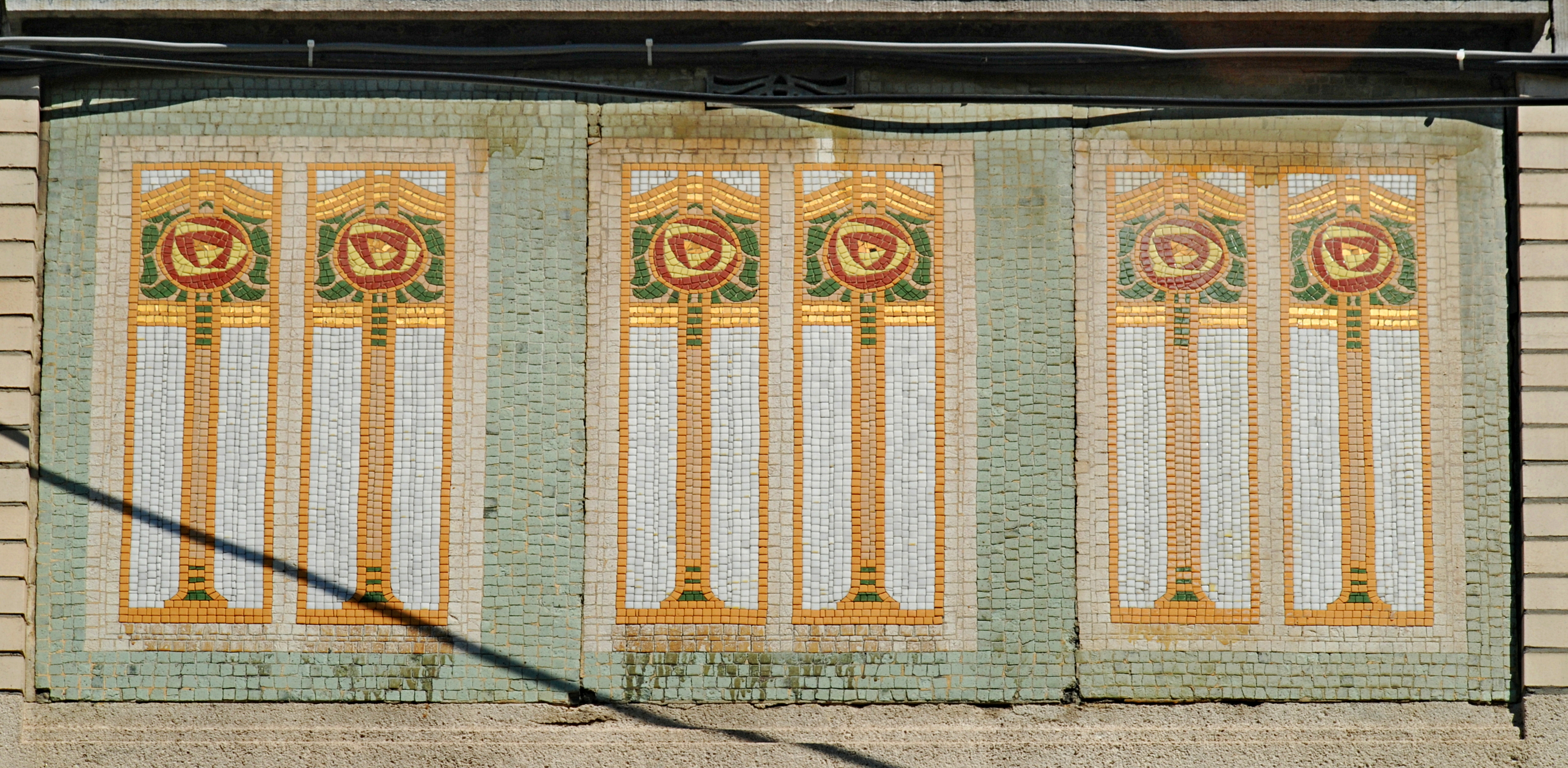 Belgique - Bruxelles - Ancien Institut pour le traitement des maladies des yeux du docteur Coppez (Art nouveau, architecte Jean-Baptiste Dewin, 1912)